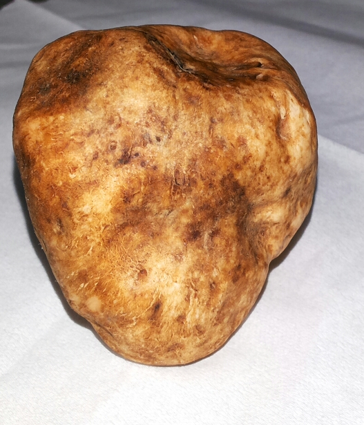 در یامچی این نوع دونبلان بیشتر یافت میشود. که البته دنبلان سفید نیز یافت میشود